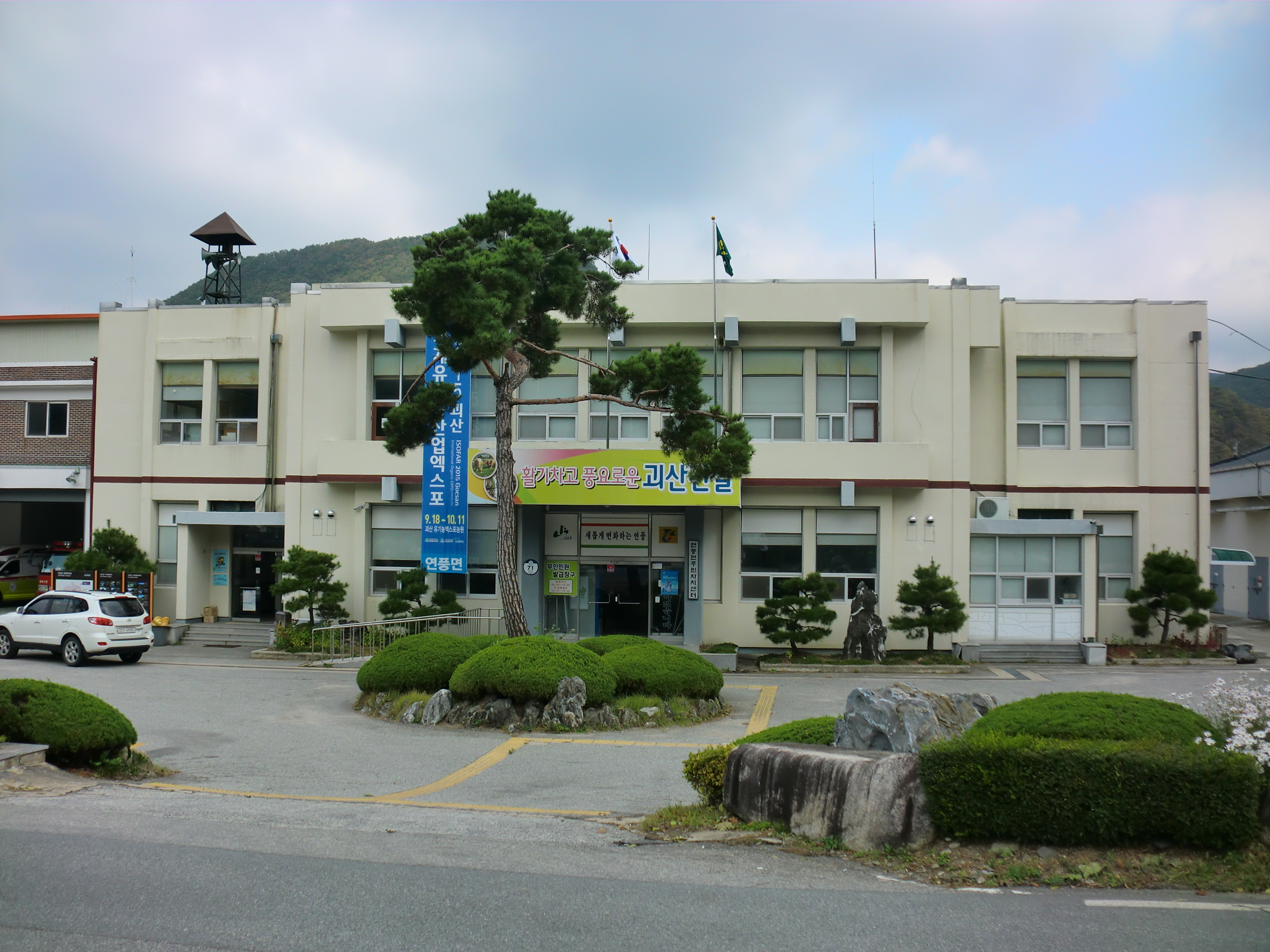 충청북도 괴산군에 있는 연풍면사무소